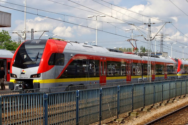 FLIRT 3 dla Łódzkiej Kolei Aglomeracyjnej podczas prezentacji